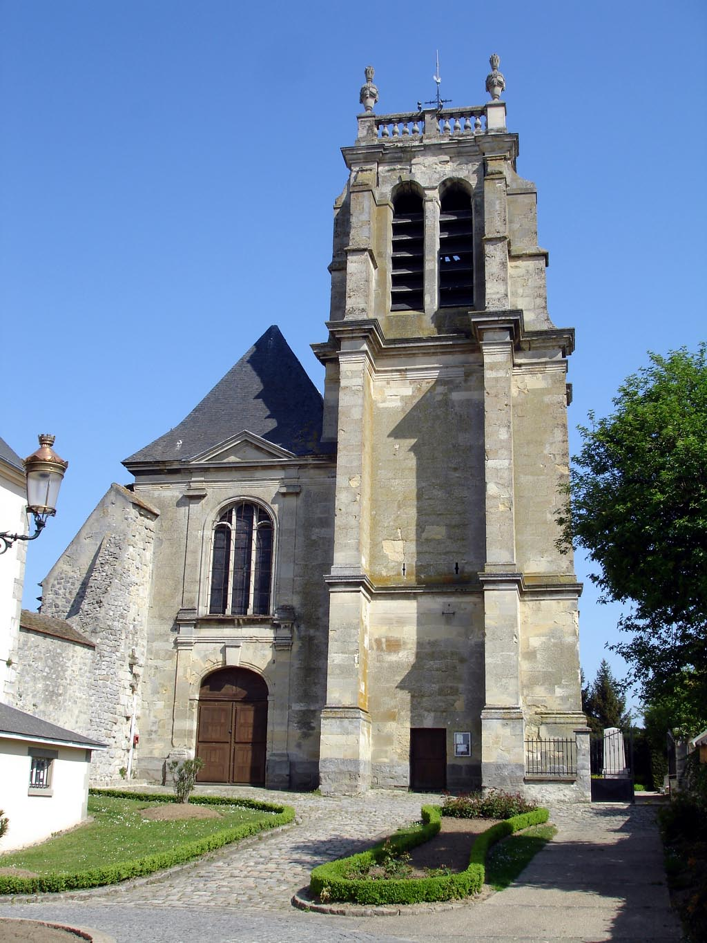 Facade de l'église Saint-Martin à Attainville (Val-d'Oise), France